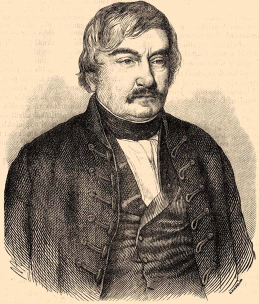 László Palóczy, Hungarian politician (1783–1861)